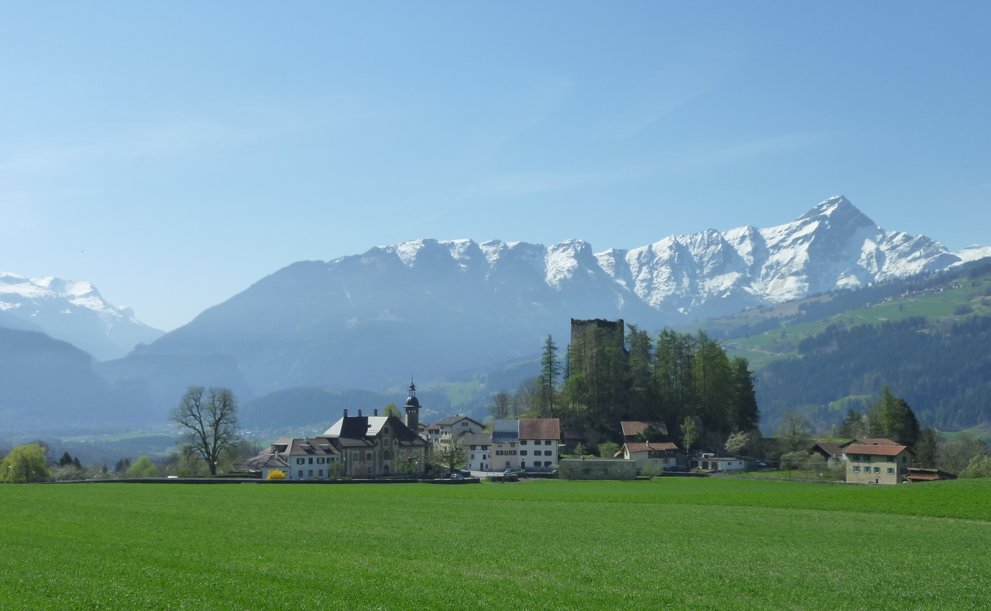 Schloss Paspels Ansicht mit Piz Beverin